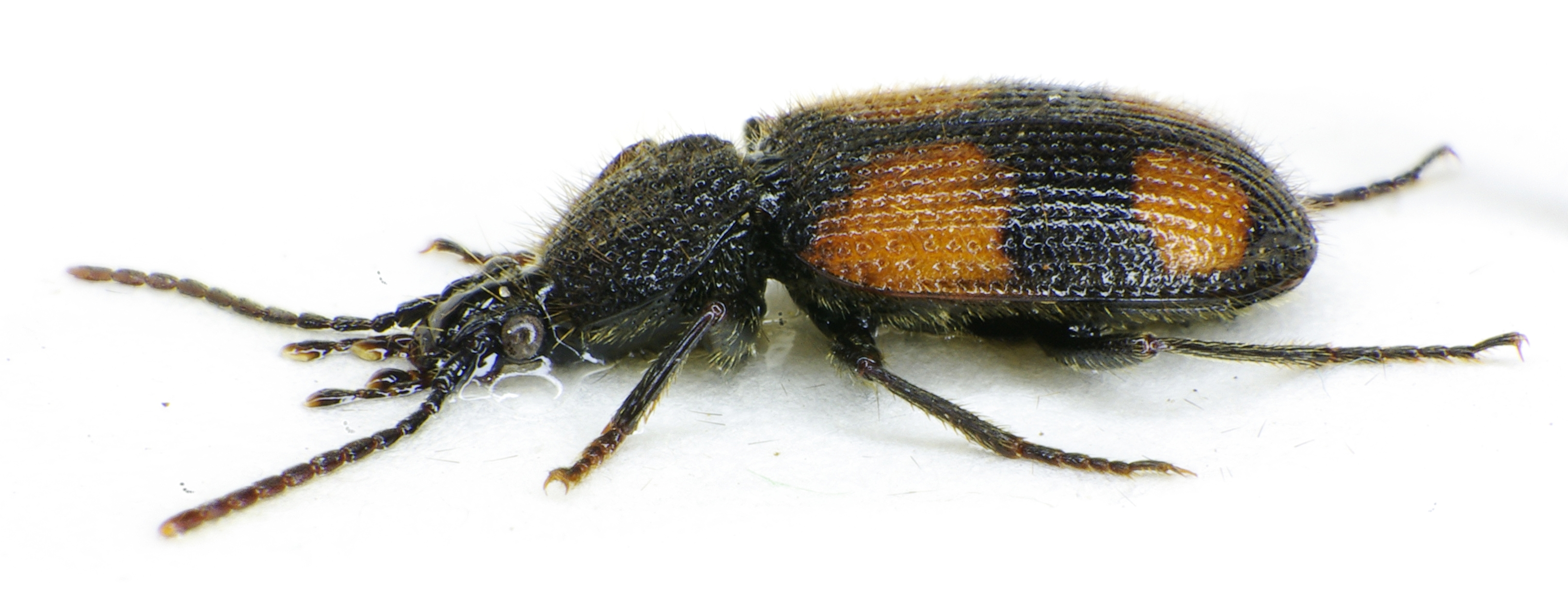 Side of Panagaeus bipustulatus